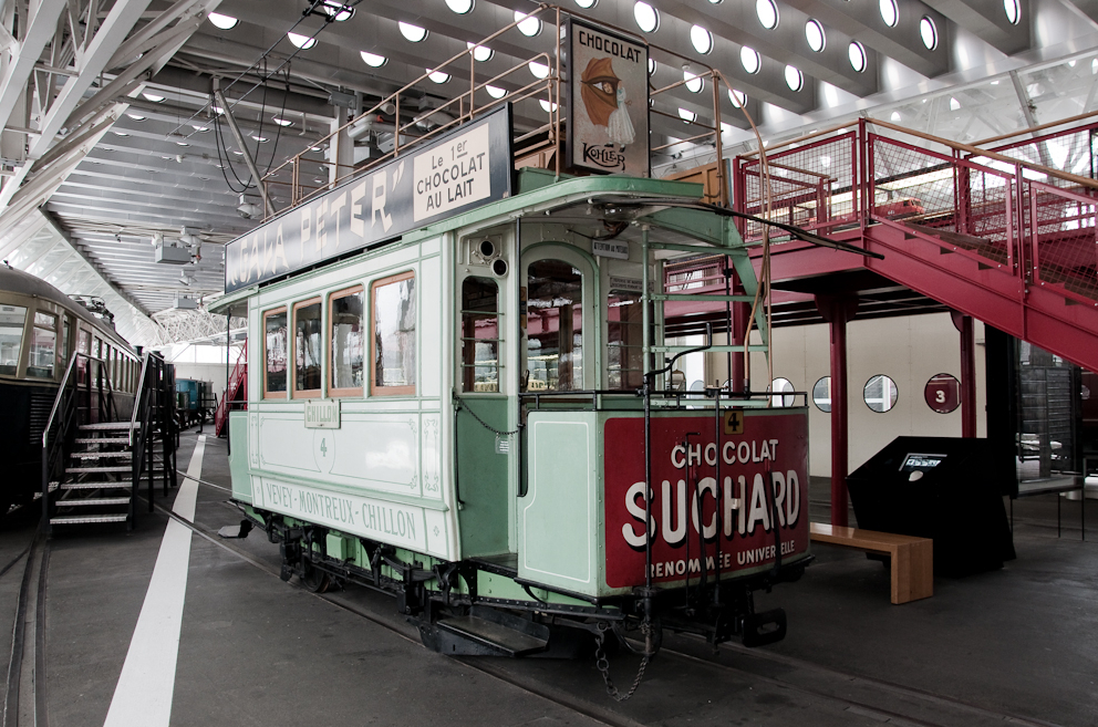 20100131-DSC_2257